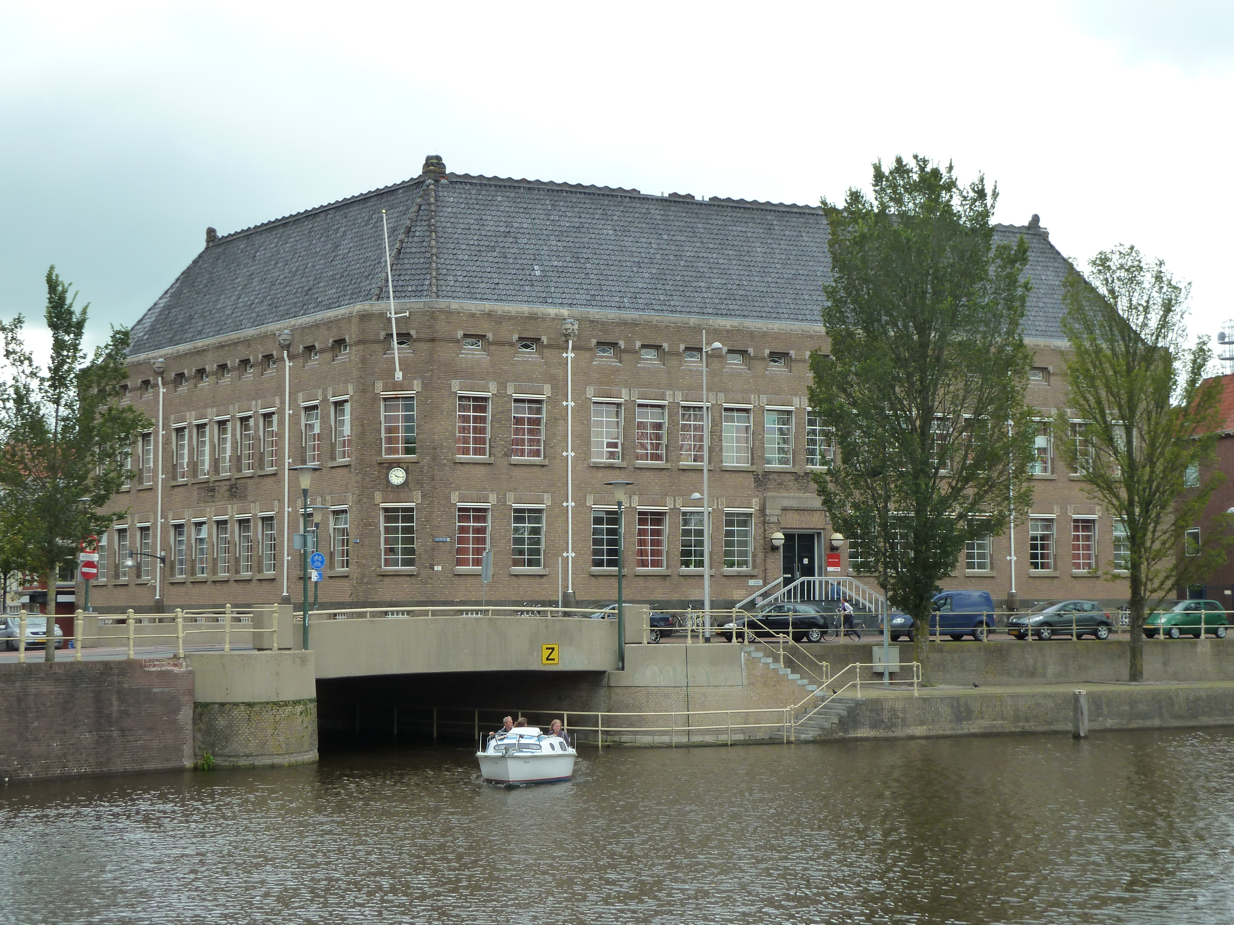 Nieuweweg 3, Leeuwarden: Friesche Bank. Voormalig bankgebouw in een beheerste Amsterdamse Schoolstijl in 1919-1921 gebouwd op de hoek van de Nieuweweg en de Weaze naar ontwerp van Geert Stapenséa. Huizumerbrug